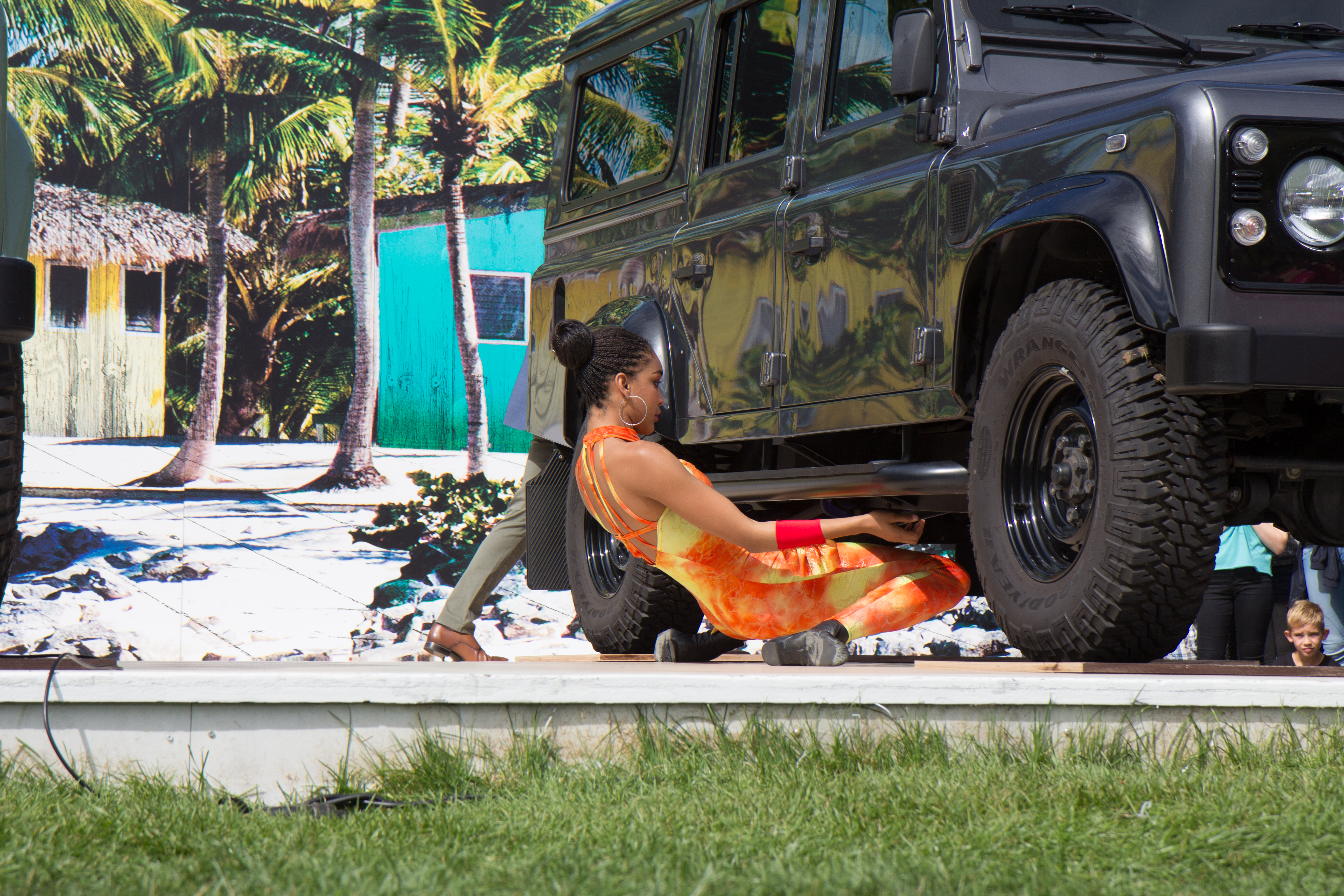 Shemika Charles, Limbo Queen, als Gast im ZDF-Fernsehgarten am 9. September 2018 in Mainz.